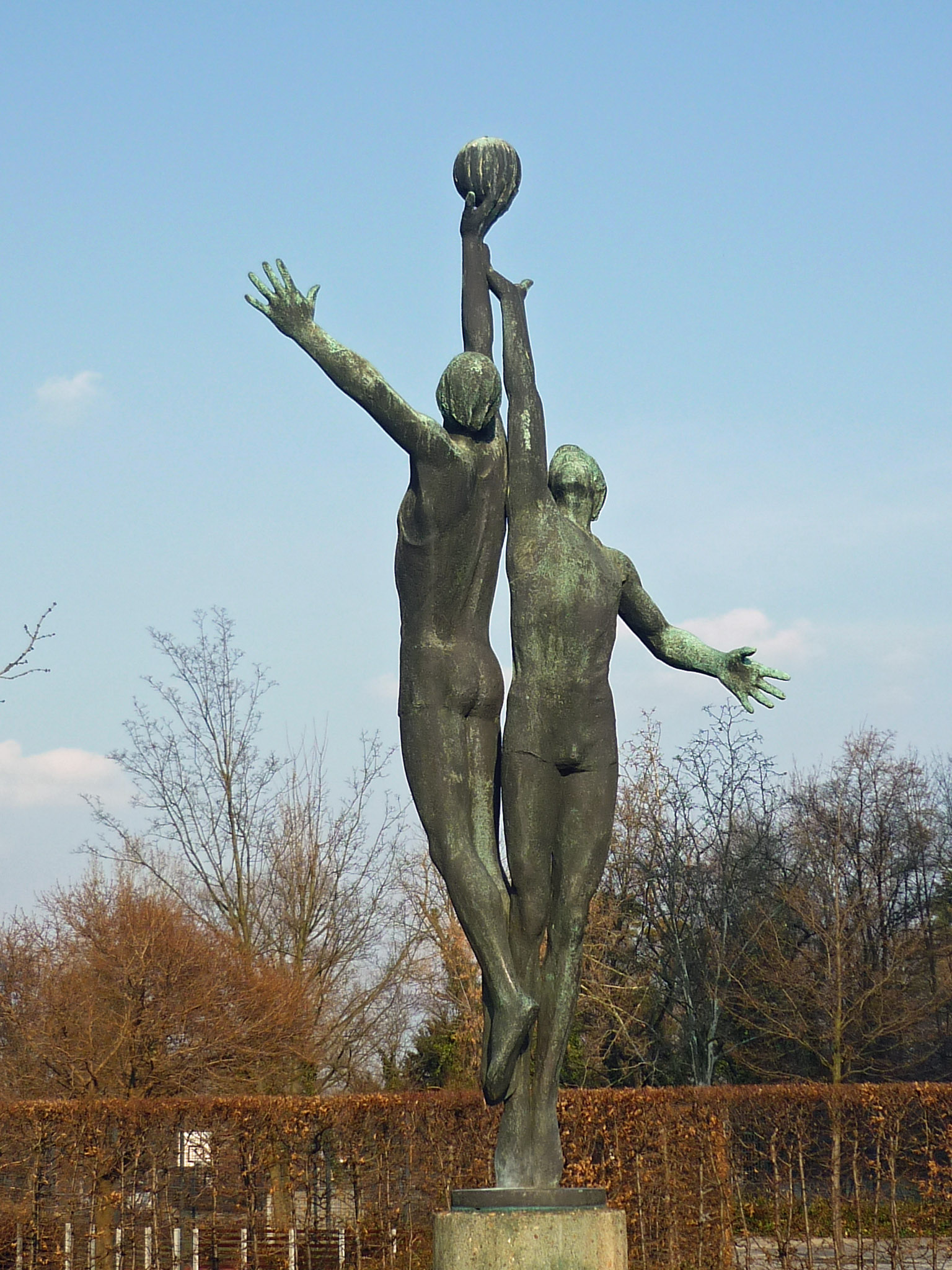 Skulptur Ballspieler bei den Studentenwohnheimen in der Wundtstr. in Dresden (Wilhelm Landgraf und Helmut Heinze, 1969-75)